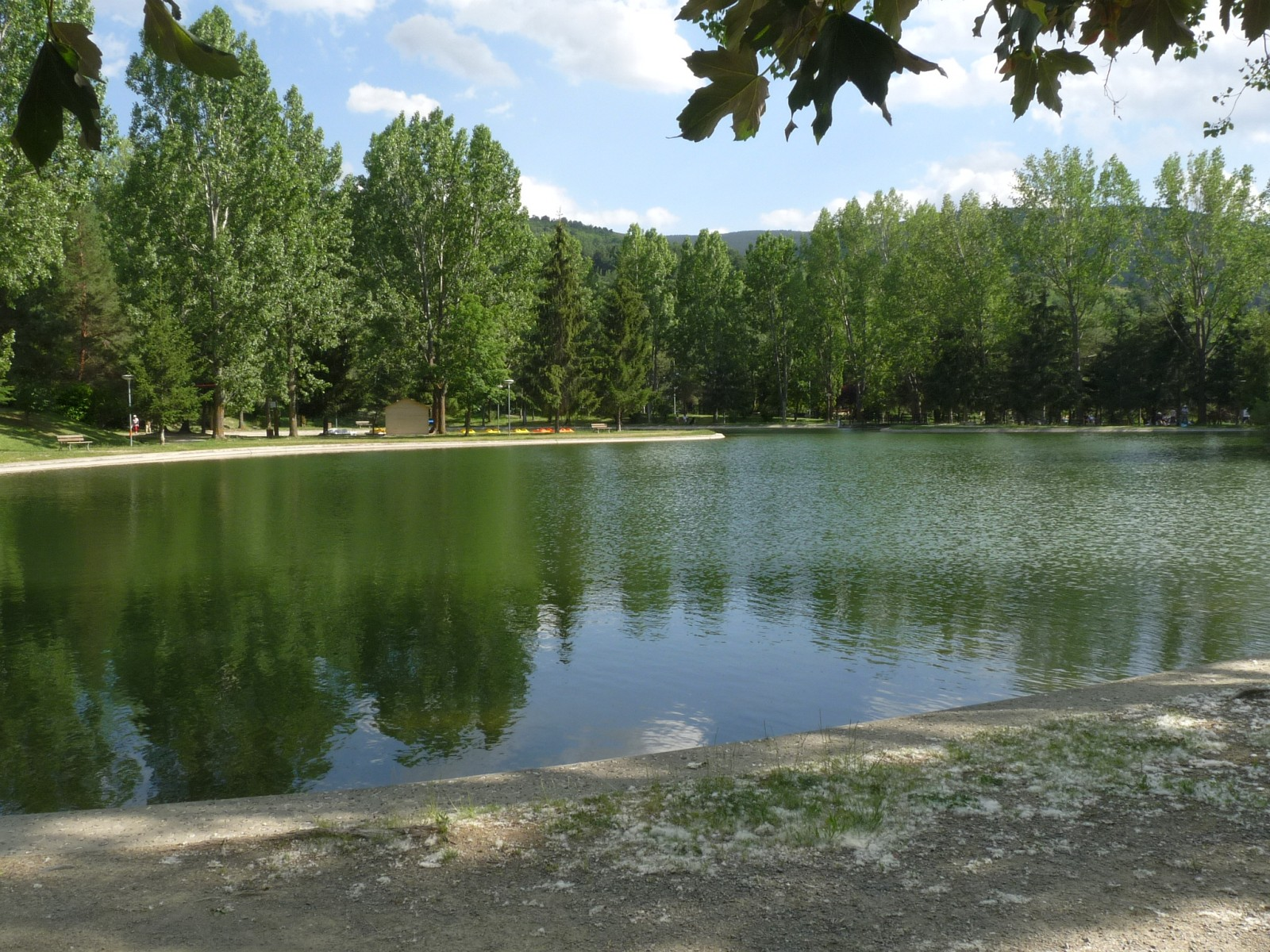 Lac d'Osséja, Pyrénées-Orientales, France